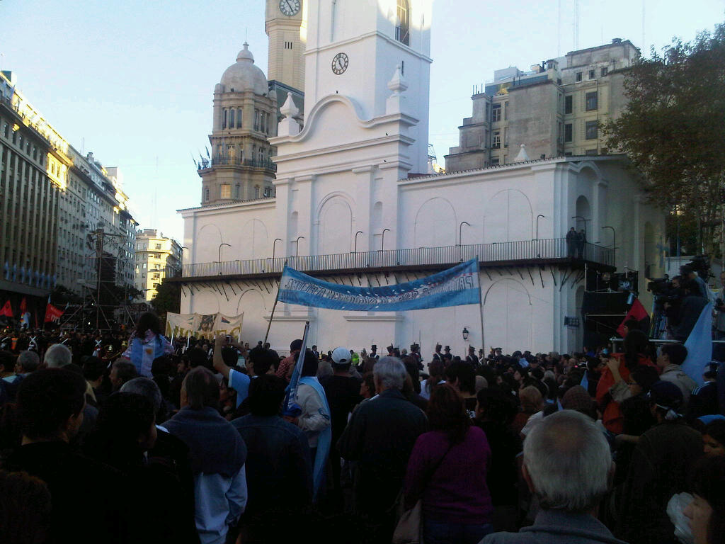 Cabildo, preparado para el videomapping, en un par de horas más.